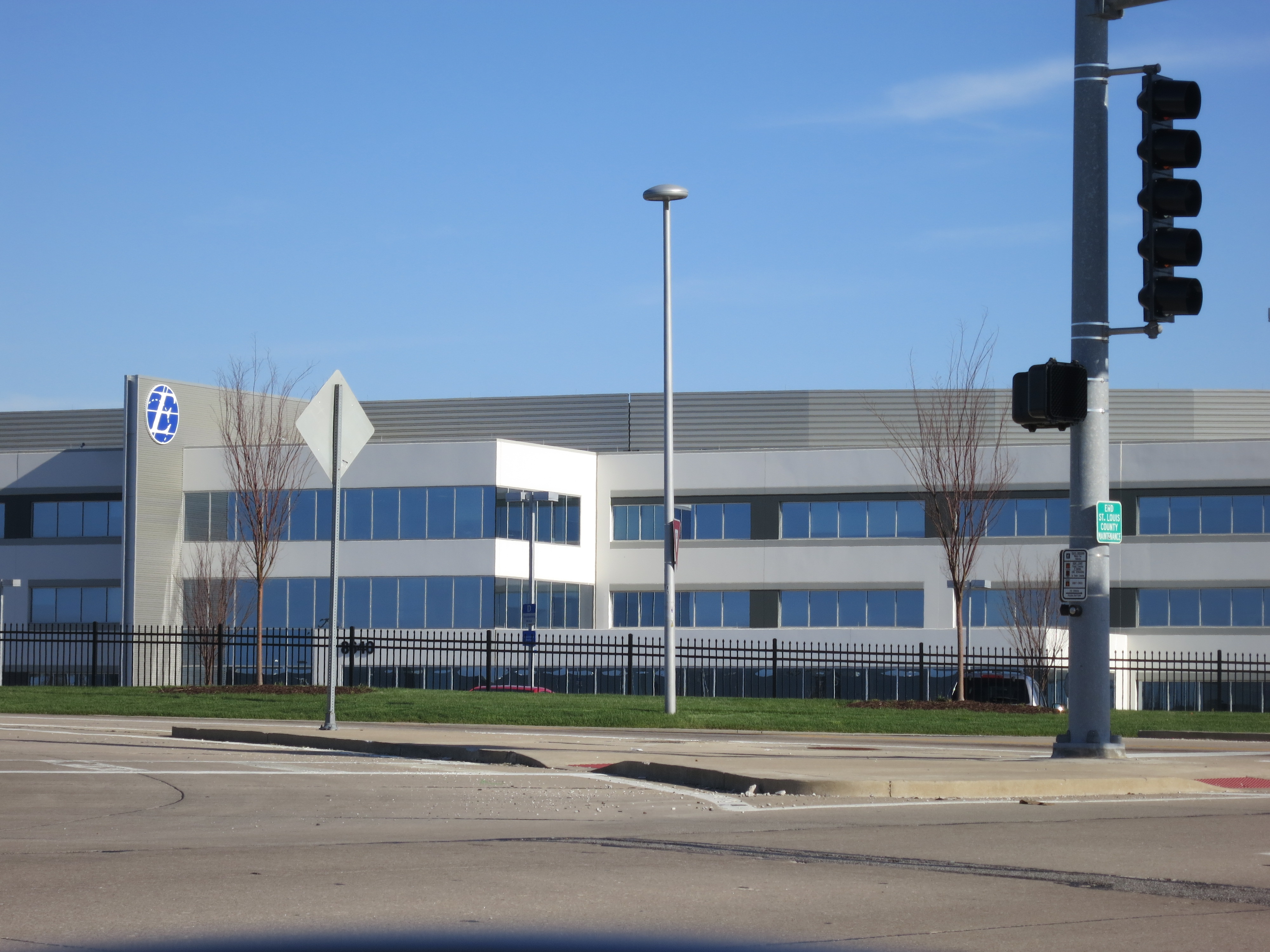 Express Scripts